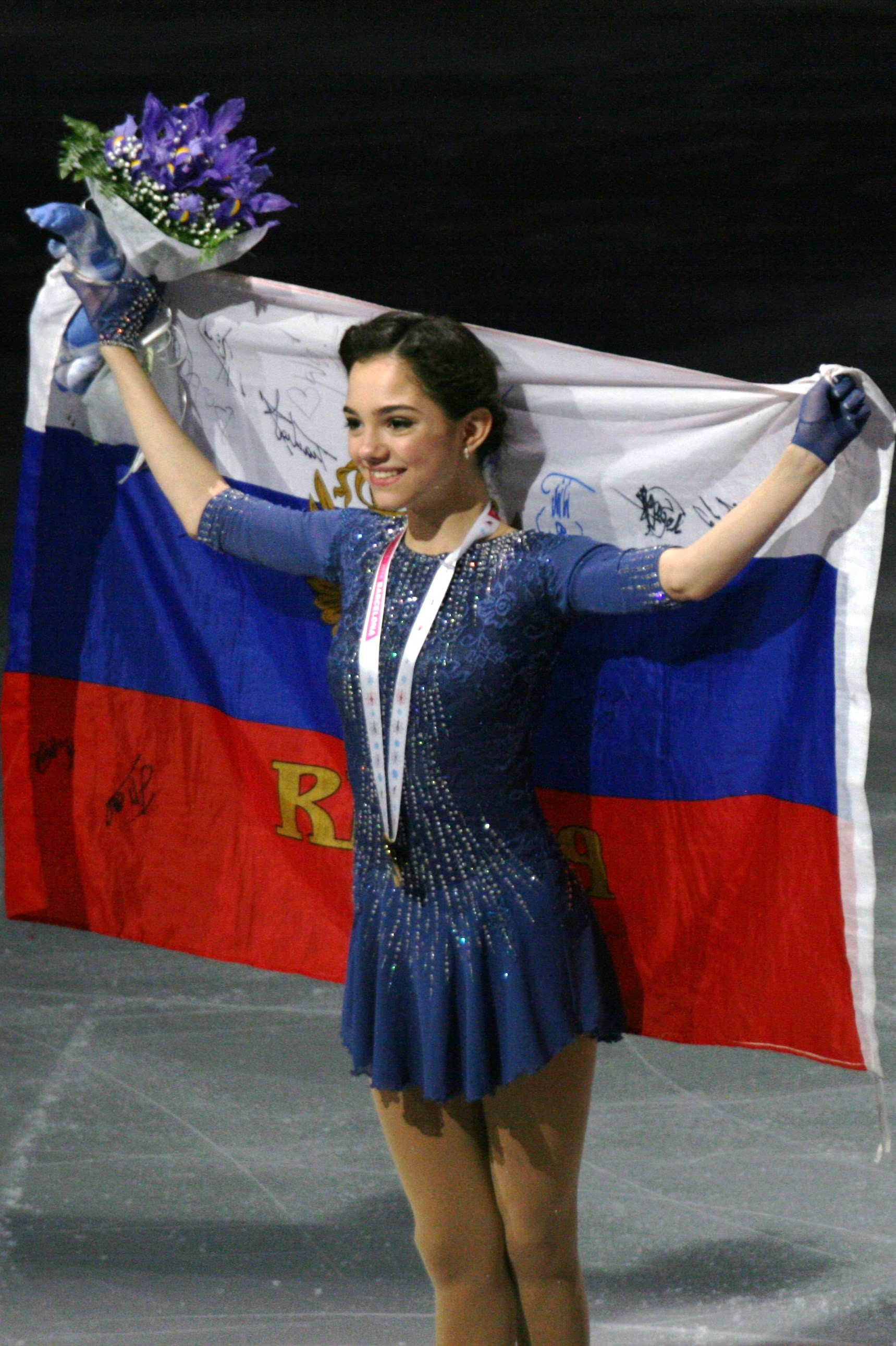 Евгения Медведева (Россия) 1-е место на финале Гран-при по фигурному катанию 2015-2016, церемония награждения.